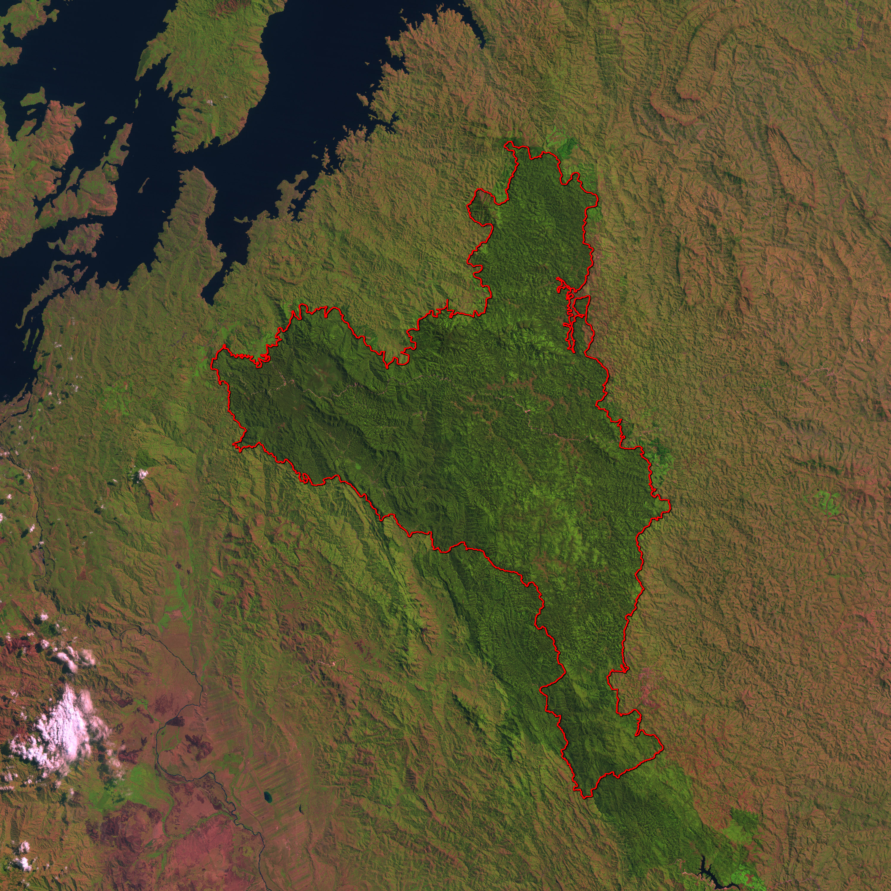 Satelliidipilt Nyungwe rahvuspargist